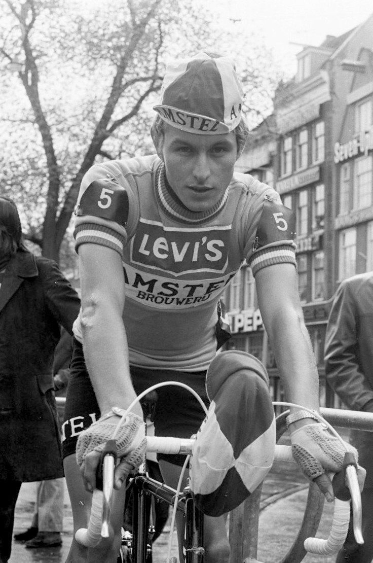 Start van de Olympia's Tour, 8-daags Nederlands wielerevenement. Wielrenner Arie Hassink aan de start in Amsterdam (2e dag)